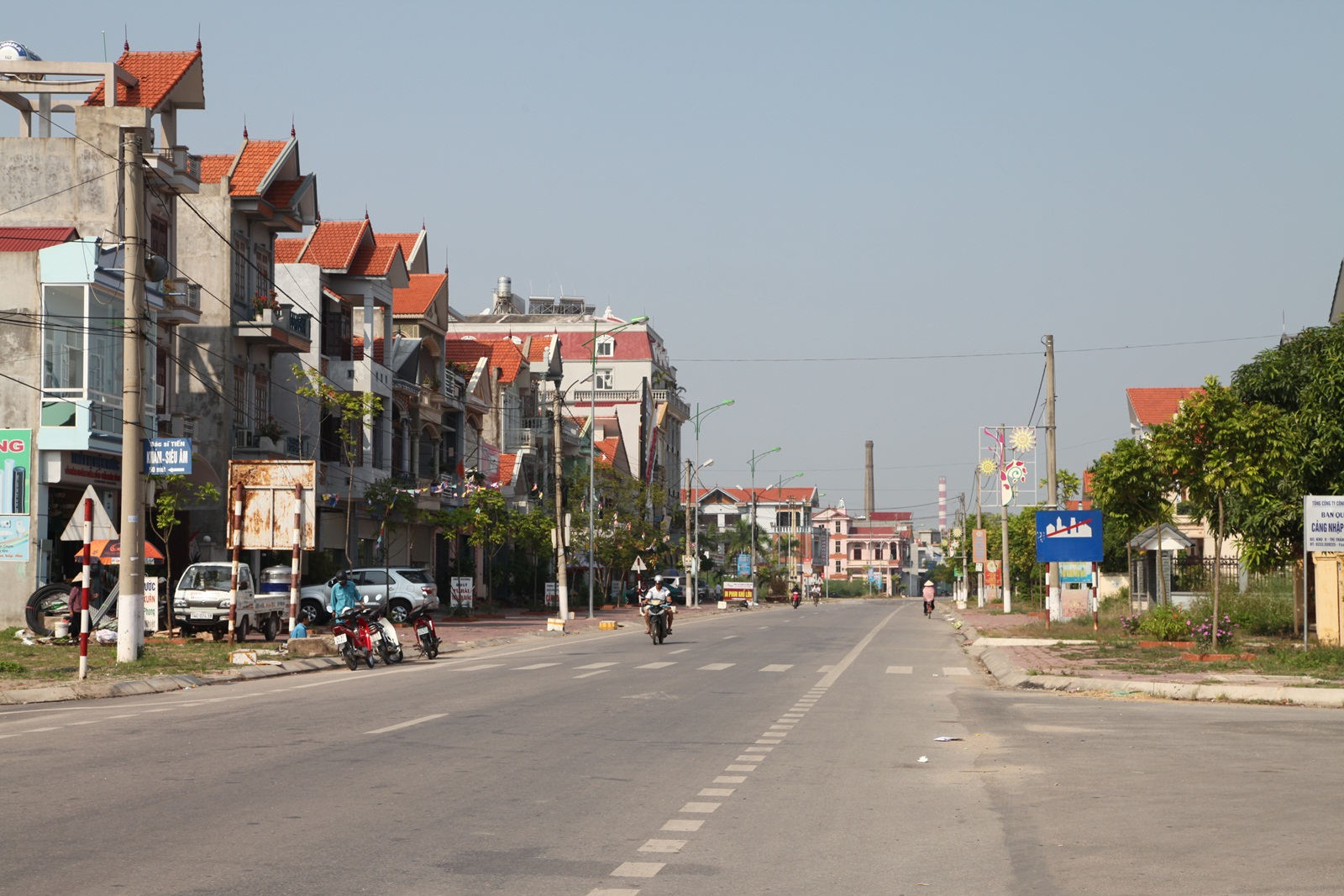 Thị xã Quảng Yên, Quảng Ninh, Việt Nam